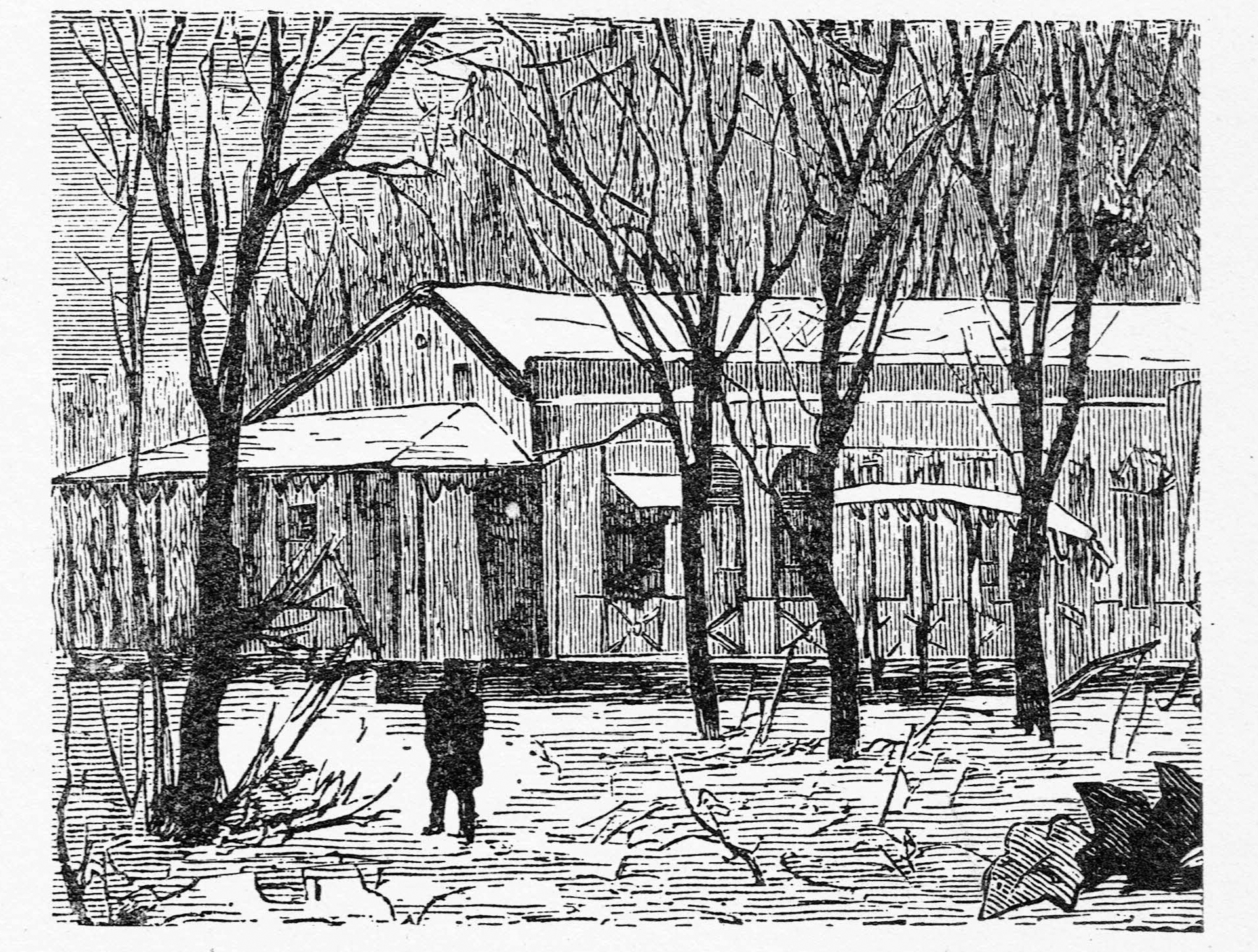 Humlegårdsteatern